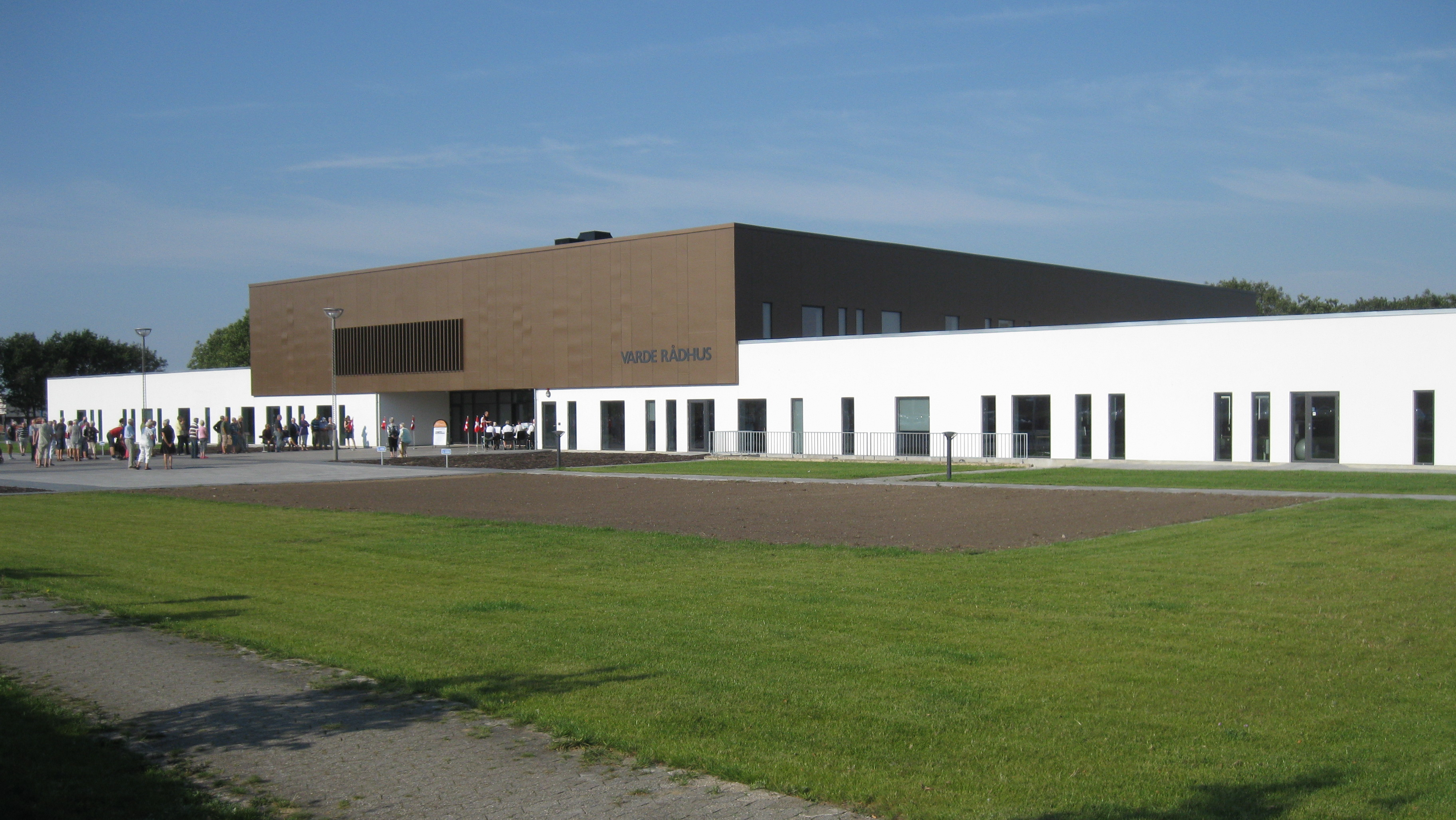 Det nye rådhus i Varde